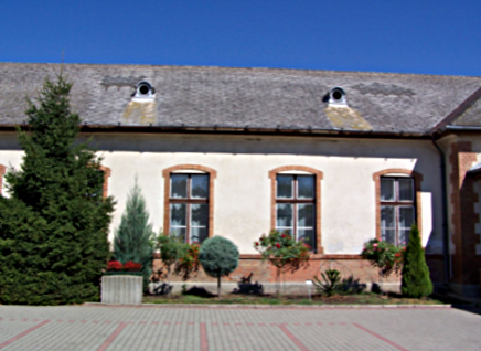 Belső udvar részlete rózsafákkal, tujákkal, alakfákkal (Szabadegyháza Község Arborétuma)